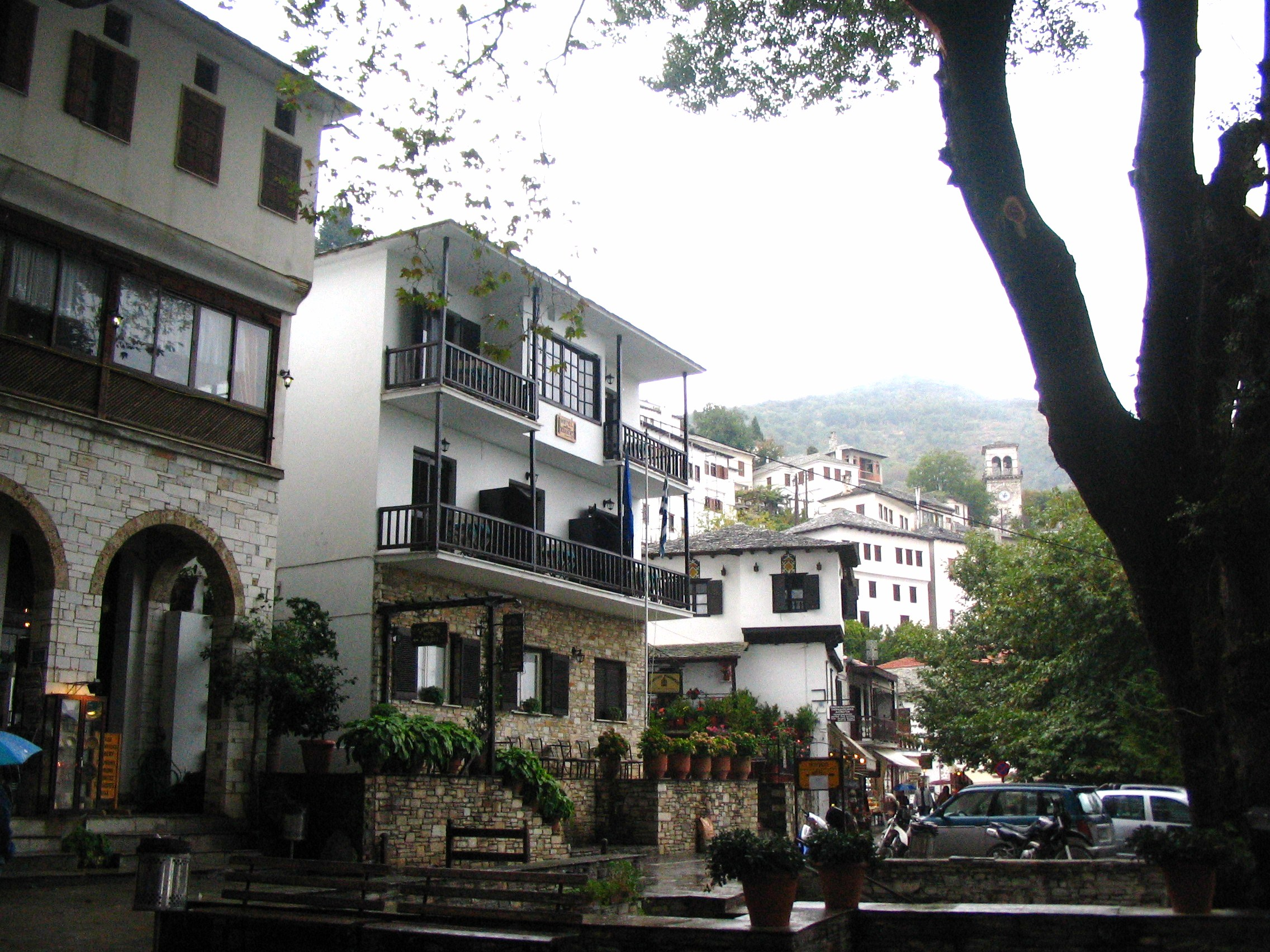 Деревня Макриница на полуострове Пилио, Греция